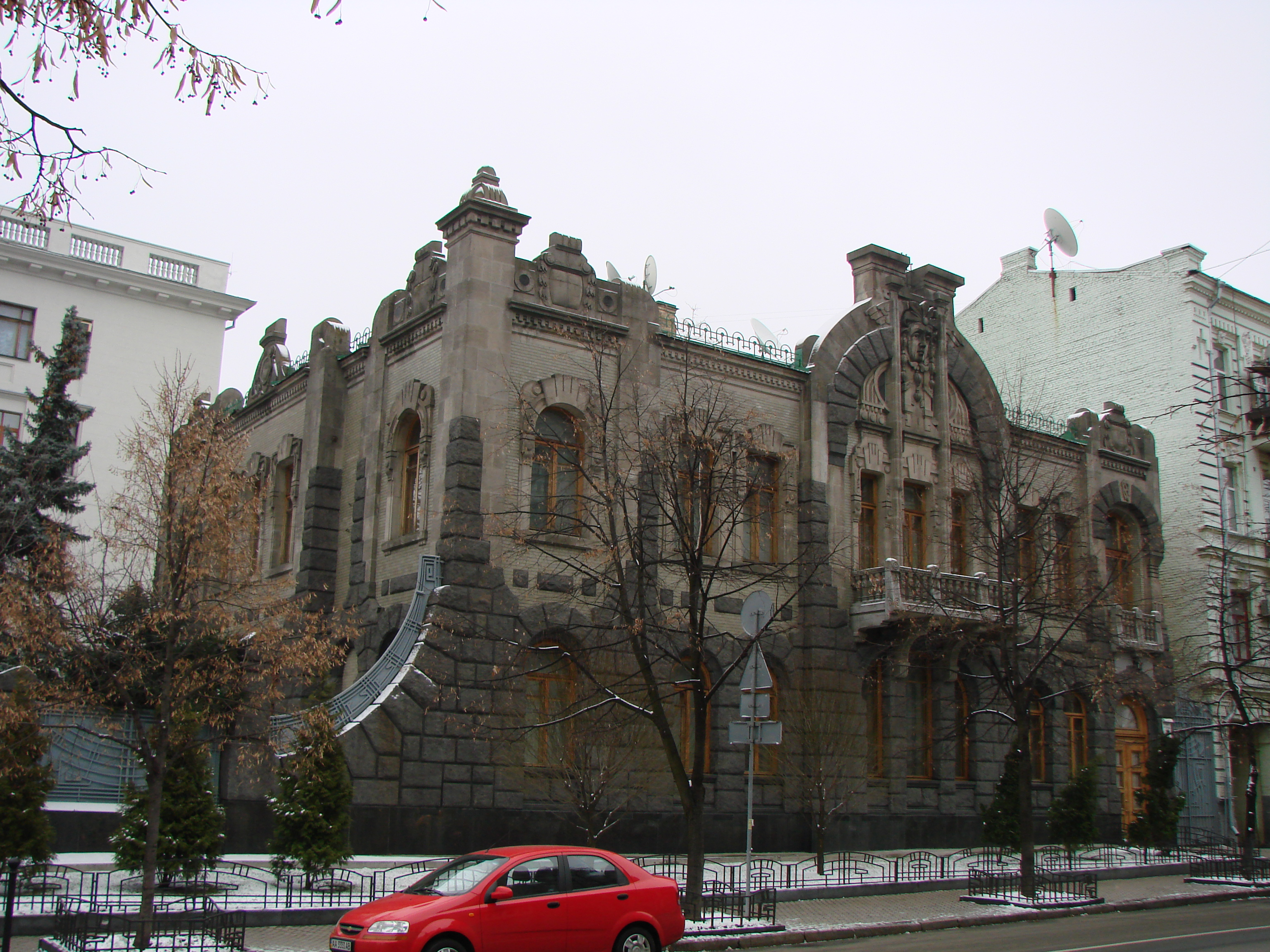 Будинок № 23 по Лютеранській вулиці у Києві